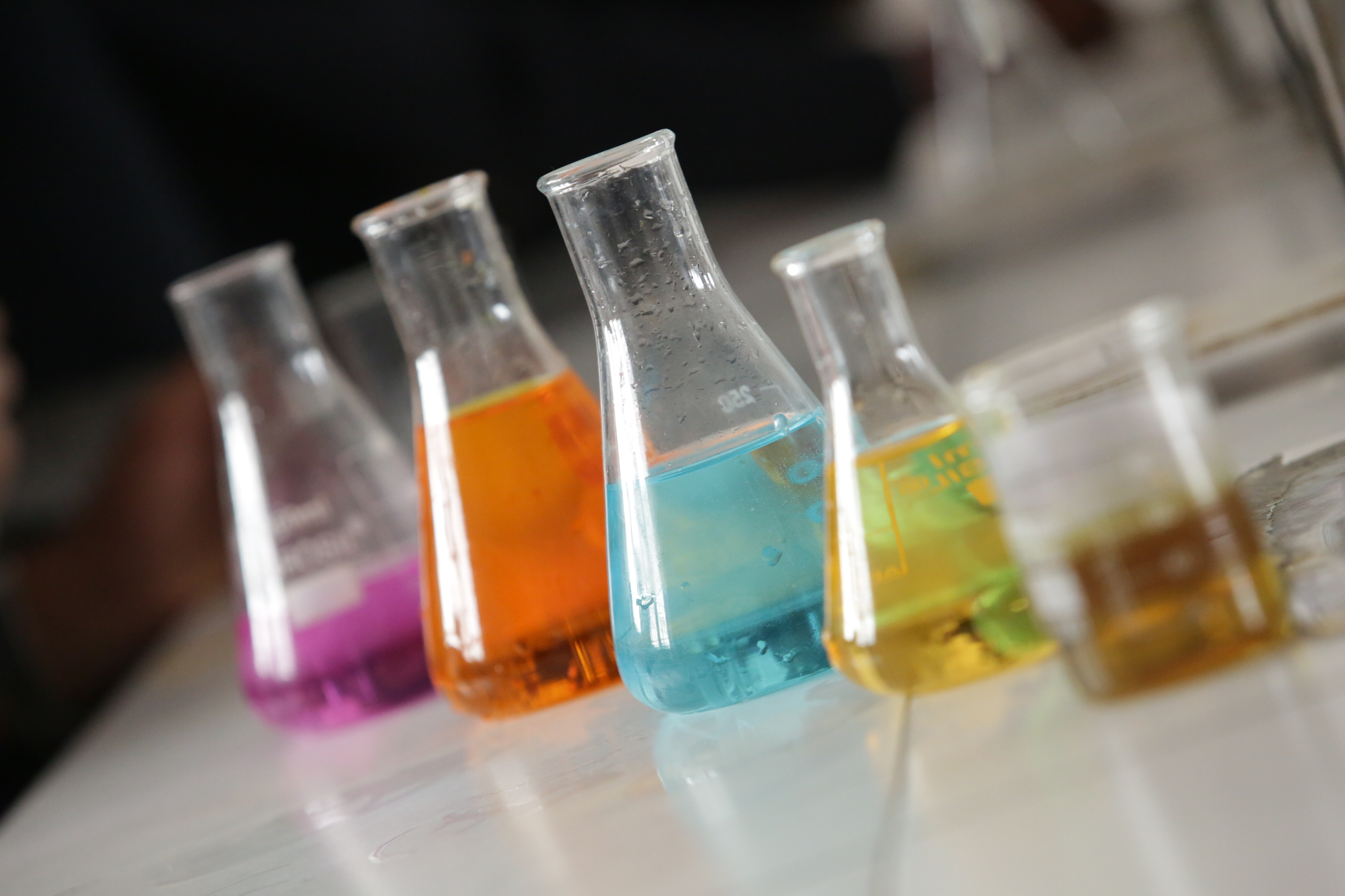 Ciències Experimentals aplicadess a l'ensenyament